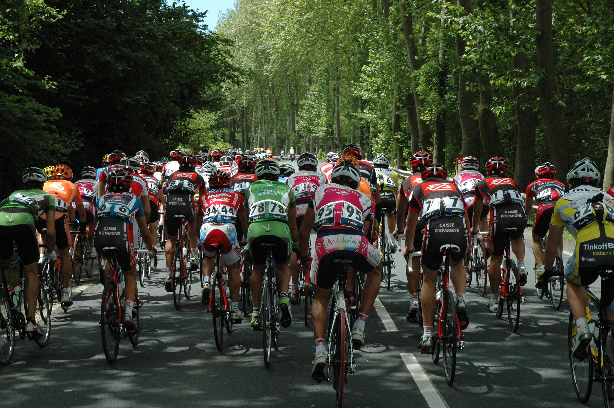 Euskal Bizikleta 2008,3rd stage.